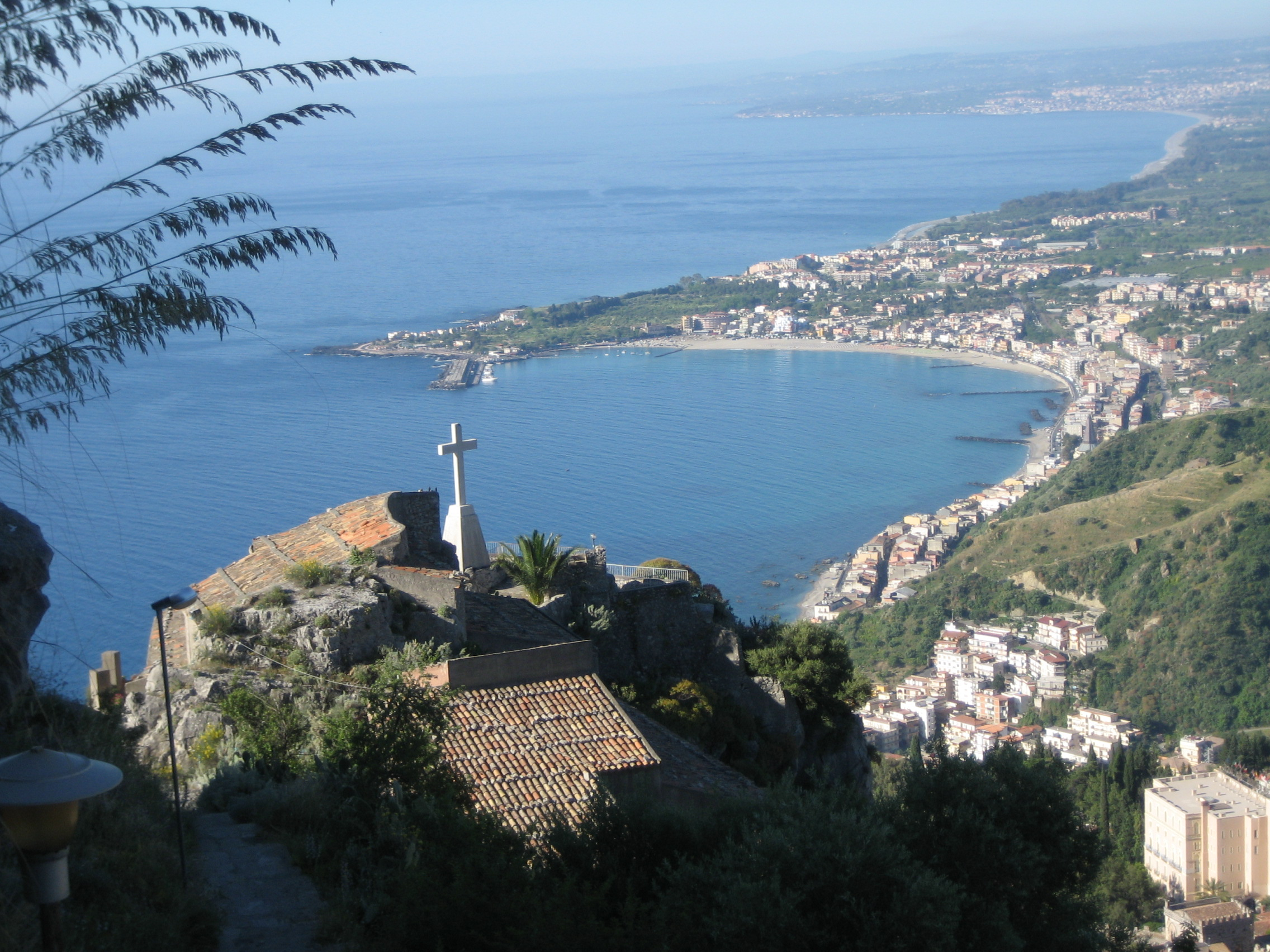 Giardini-Naxos-from-Taormina